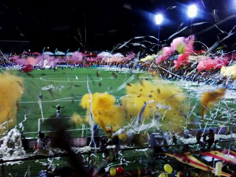 Estadio Eladio Rosabal Cordero durante la final del torneo Verano 2013